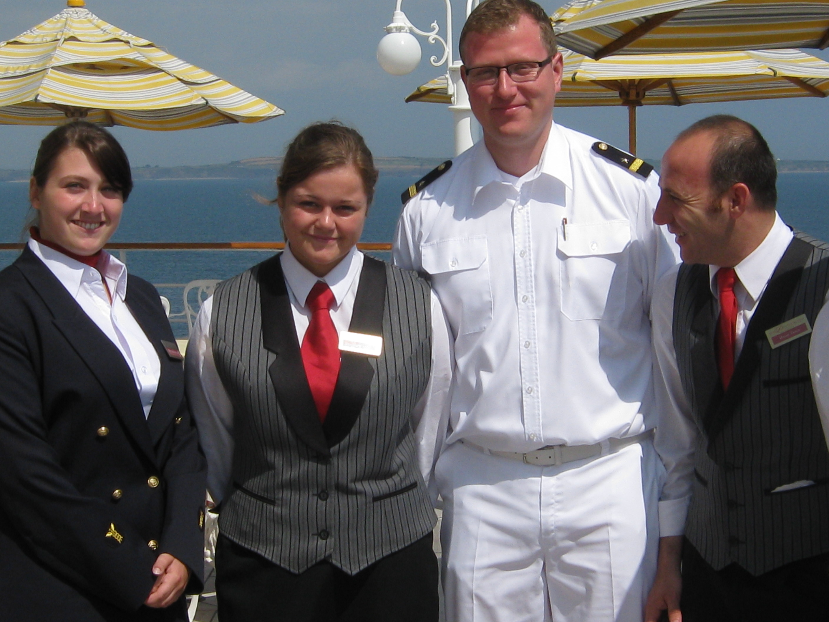 Ausbildungsoffizier und Servicemitarbeiter auf MS Deutschland